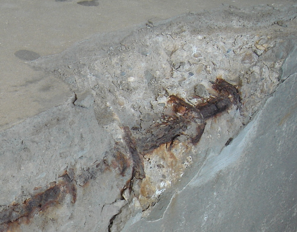 Rusting Steel in Concrete. Picture taken in Hippodroom Oostende. Betonrot (carbonatatie-geïnitieerd) in de tribune van het Hippodroom te Oostende